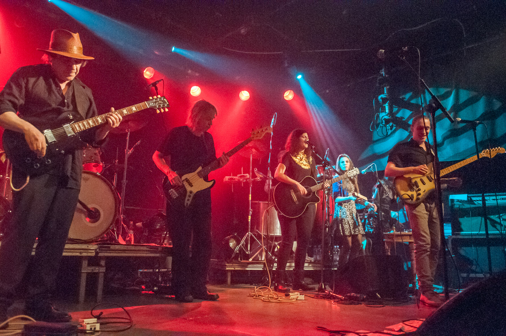 Ton Steine Scherben - Ding Ding Dang Dang-Tour 2014 im Hirsch in Nürnberg am 08.04.2014 Der Hirsch,Ding Ding Dang Dang,Konzert,Livekonzert,Livemusik,Ton Steine Scherben,Tour2014